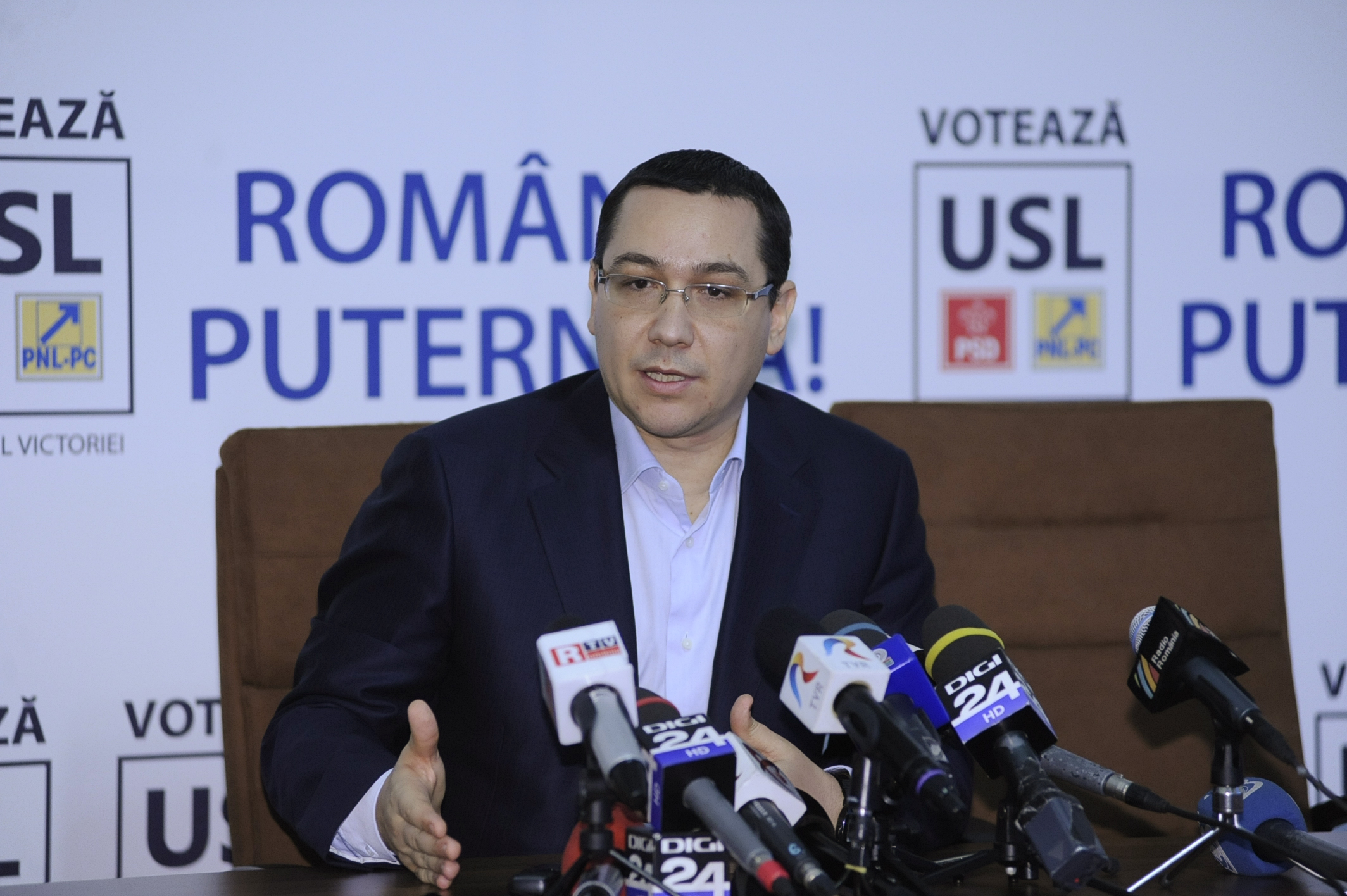 Victor Ponta la sediul USL-11.02.2014 (3)